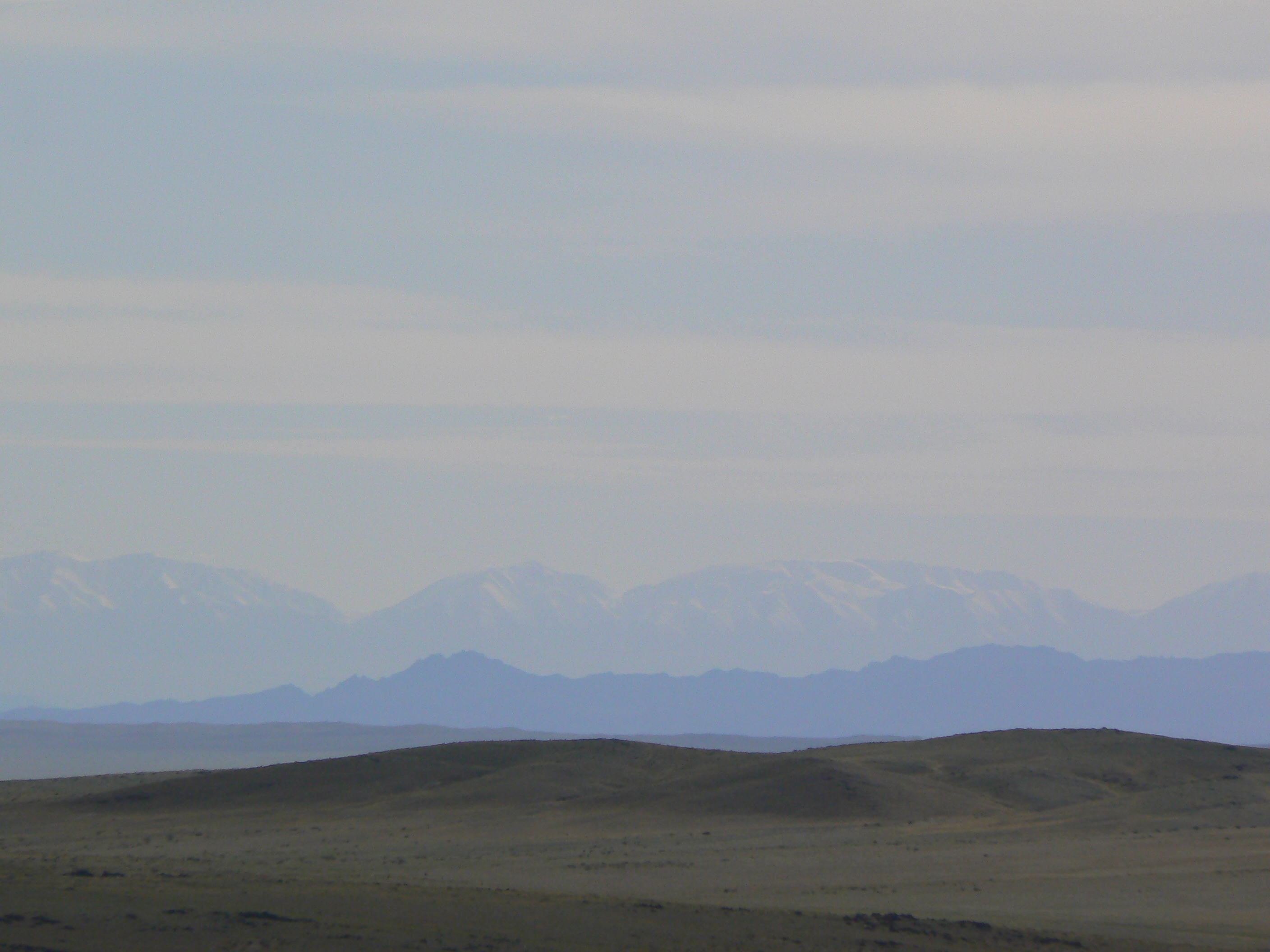 На горизонте - хребёт Гобийский Алтай